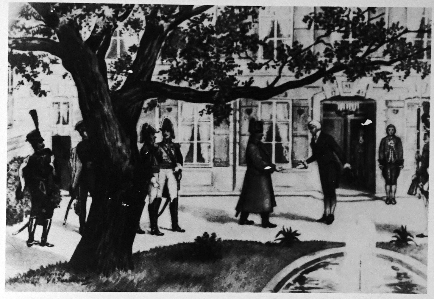 sur une vue ancienne.